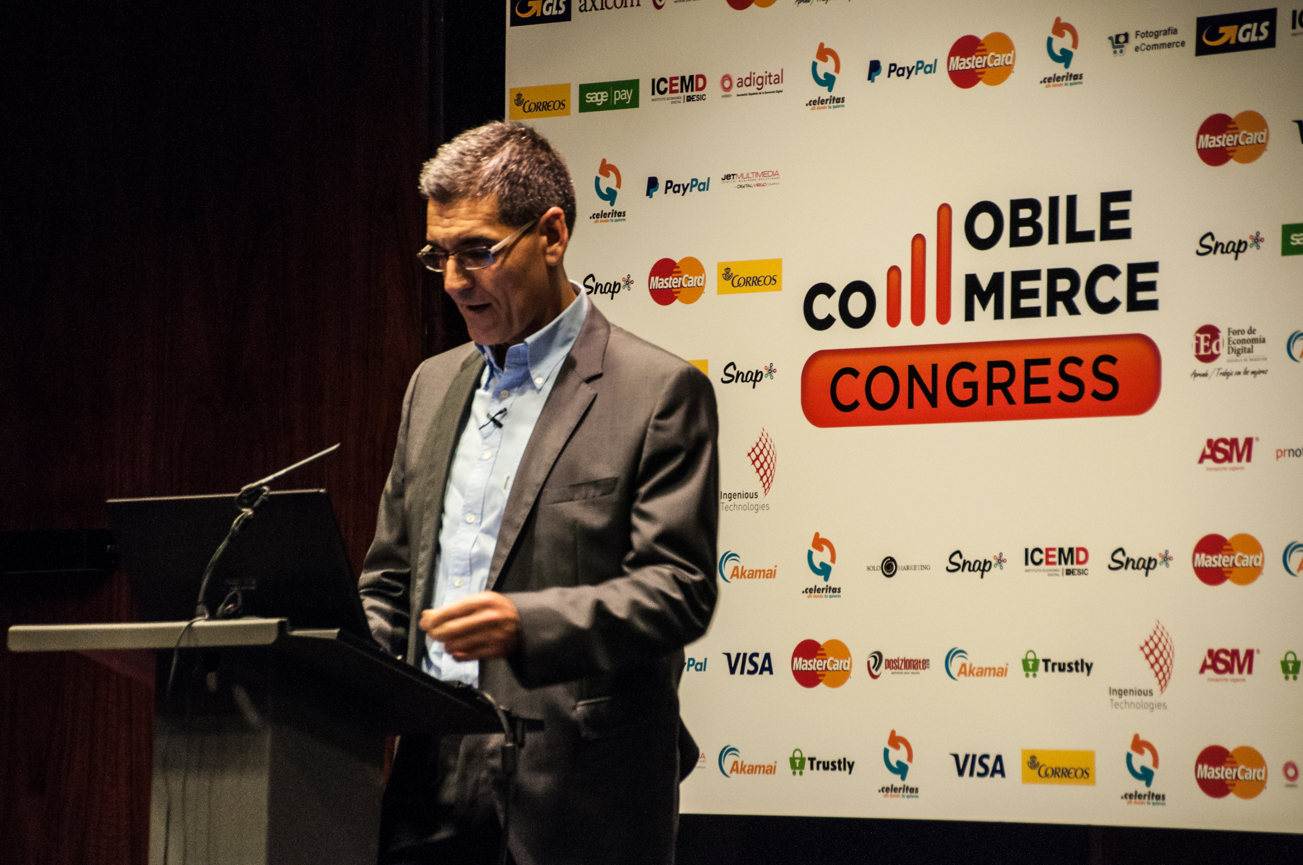 Fotos tomadas durante el evento Mobile Commerce en noviembre de 2014 (